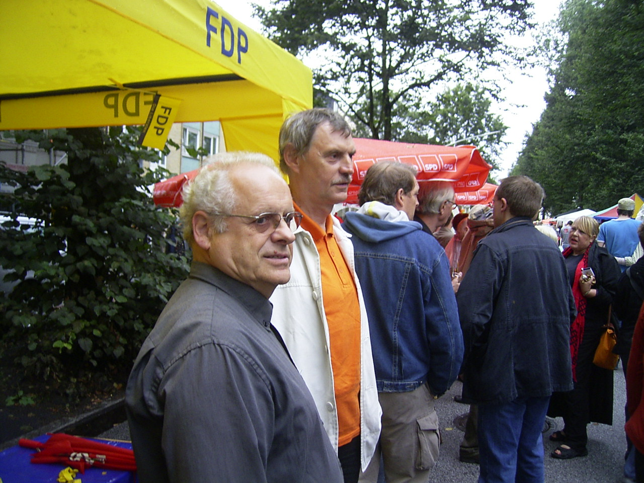 Reinhard Soltau (FDP, links) und Wilfried Buss (SPD, rechts) am 11. August 2007 auf dem Hofwegfest in Uhlenhorst.